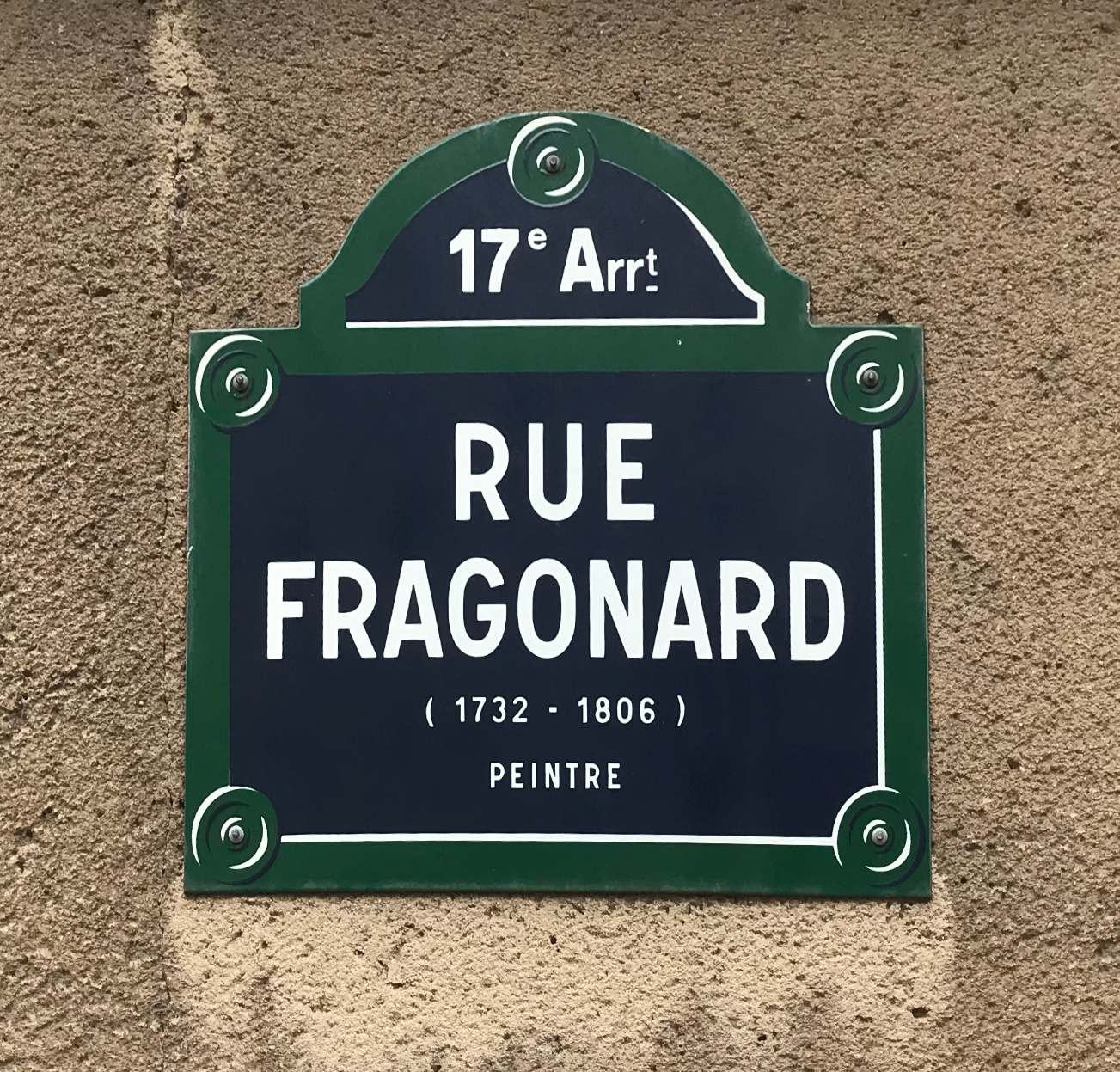 Image de Paris, septembre 2018.